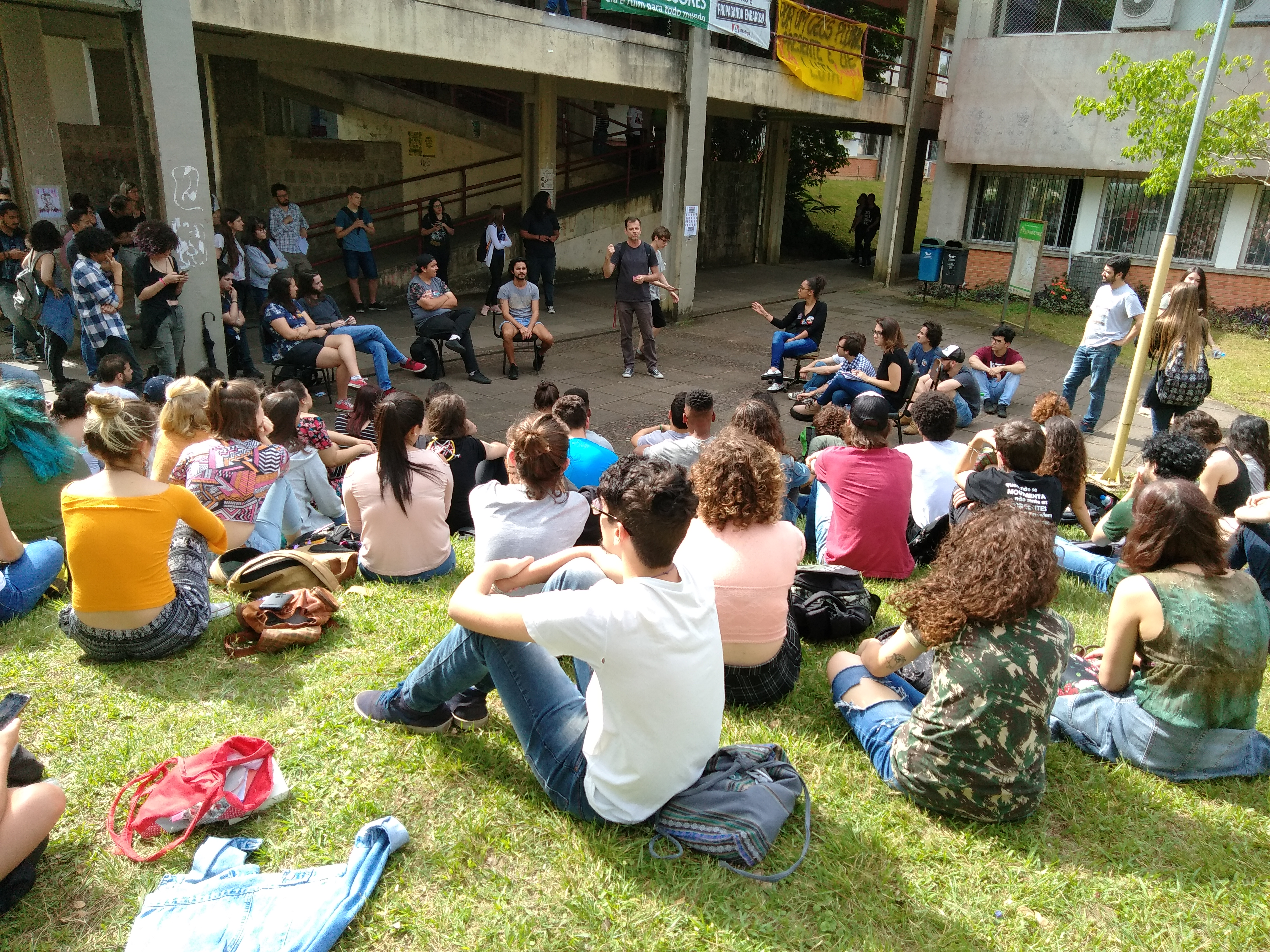 Roda de conversa contra Jair Bolsonaro na UFRGS em 10 de outubro de 2018